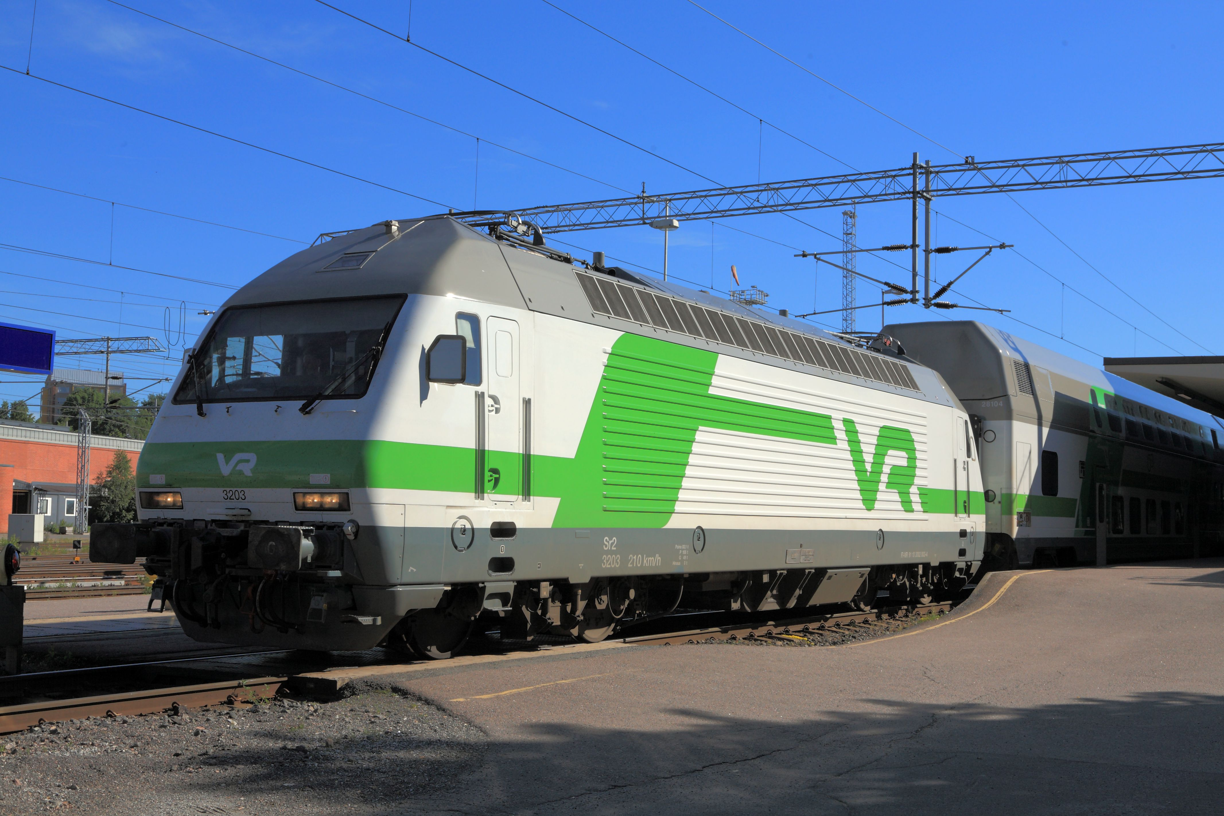 SLM-Ellok im neuen Anstrich grün/weiß mit IC2-Doppelstockwagenzug am Hausbahnsteig. Auffällig ist der Größenunterschied zwischen der für Mitteleuropa großen Lok und den das finnische Fahrzeugumgrenzungsprofil gut ausnutzenden Wagen.